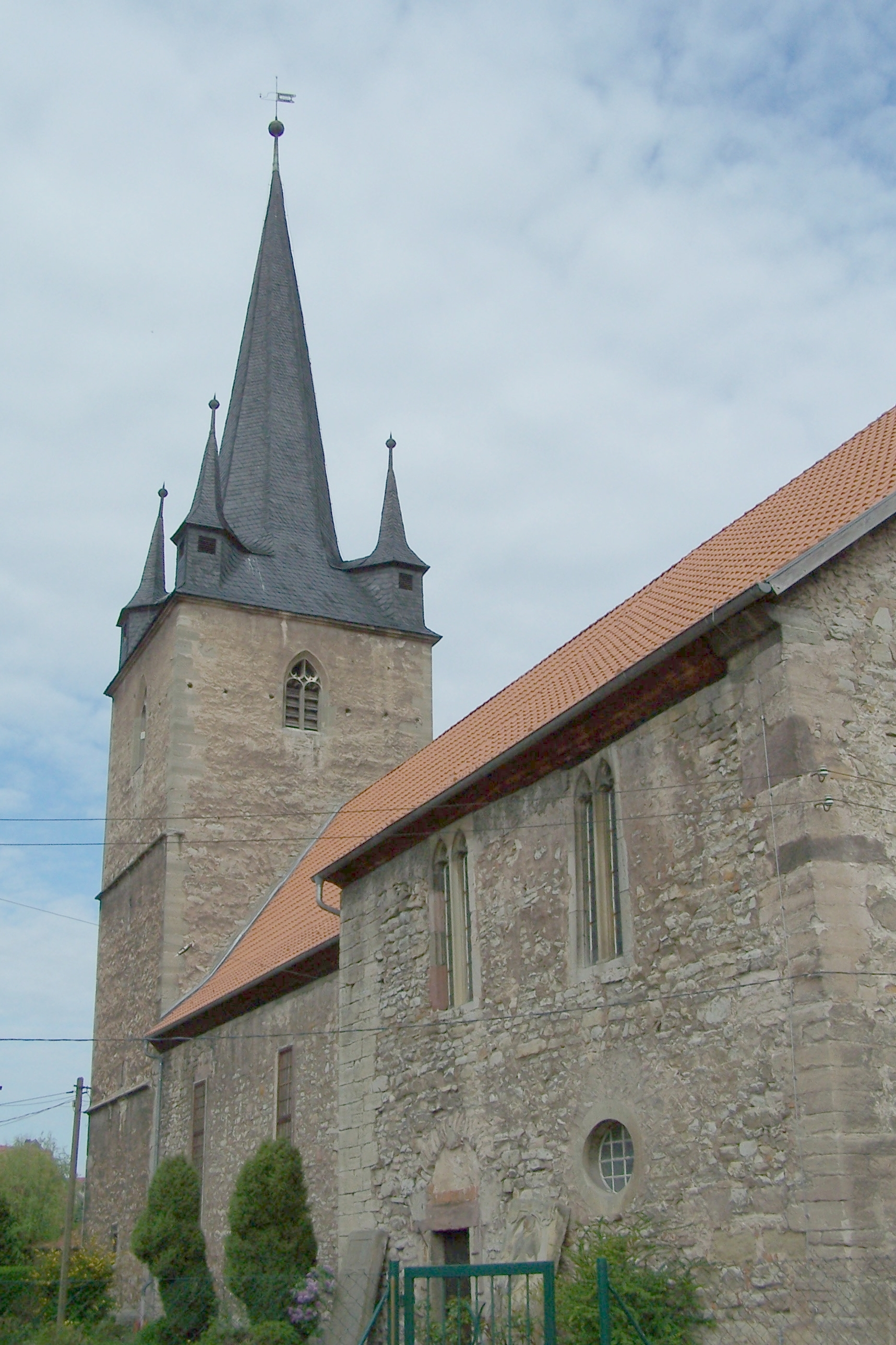 Ansichten und Details zur St.-Martin-Kirche in Falken.